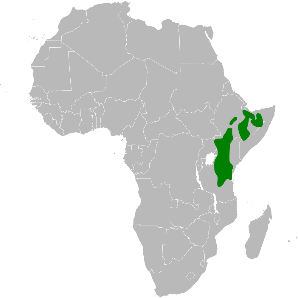 Calendulauda alopex distribution map, based on